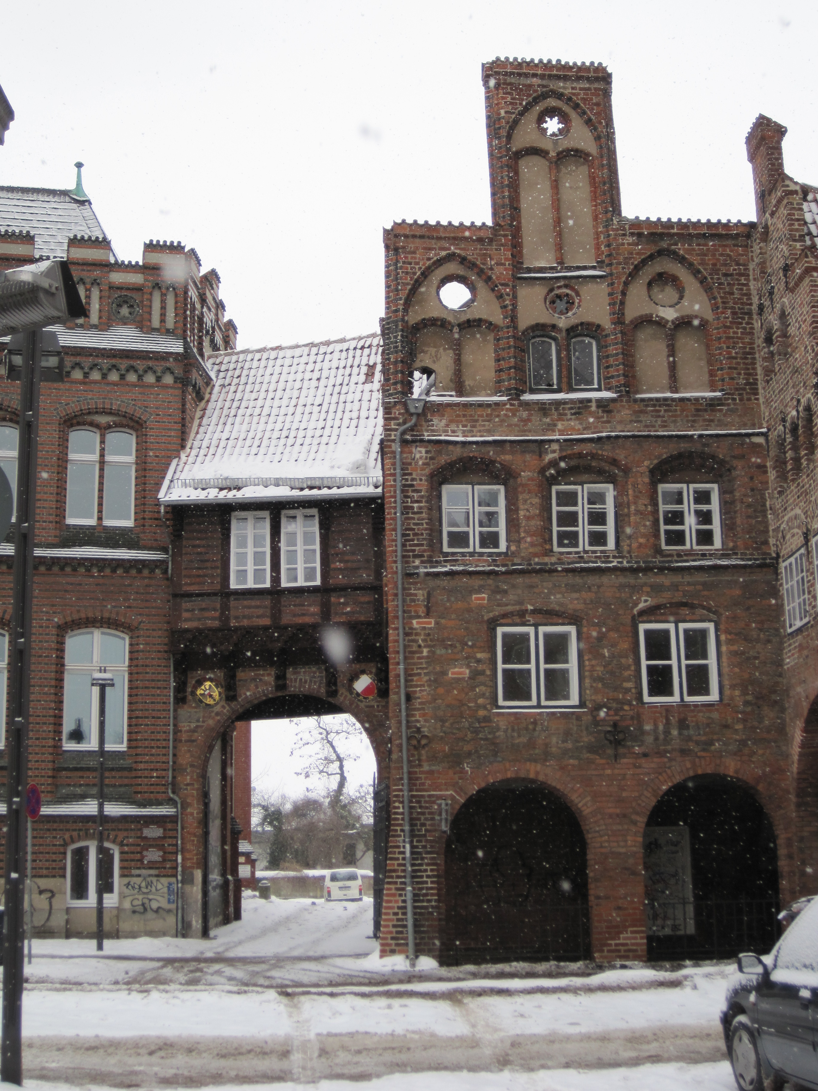 Einfahrt zum Burghof, rechts Burgschmiede am Burgtor, in der Gr. Burgstraße in Lübeck